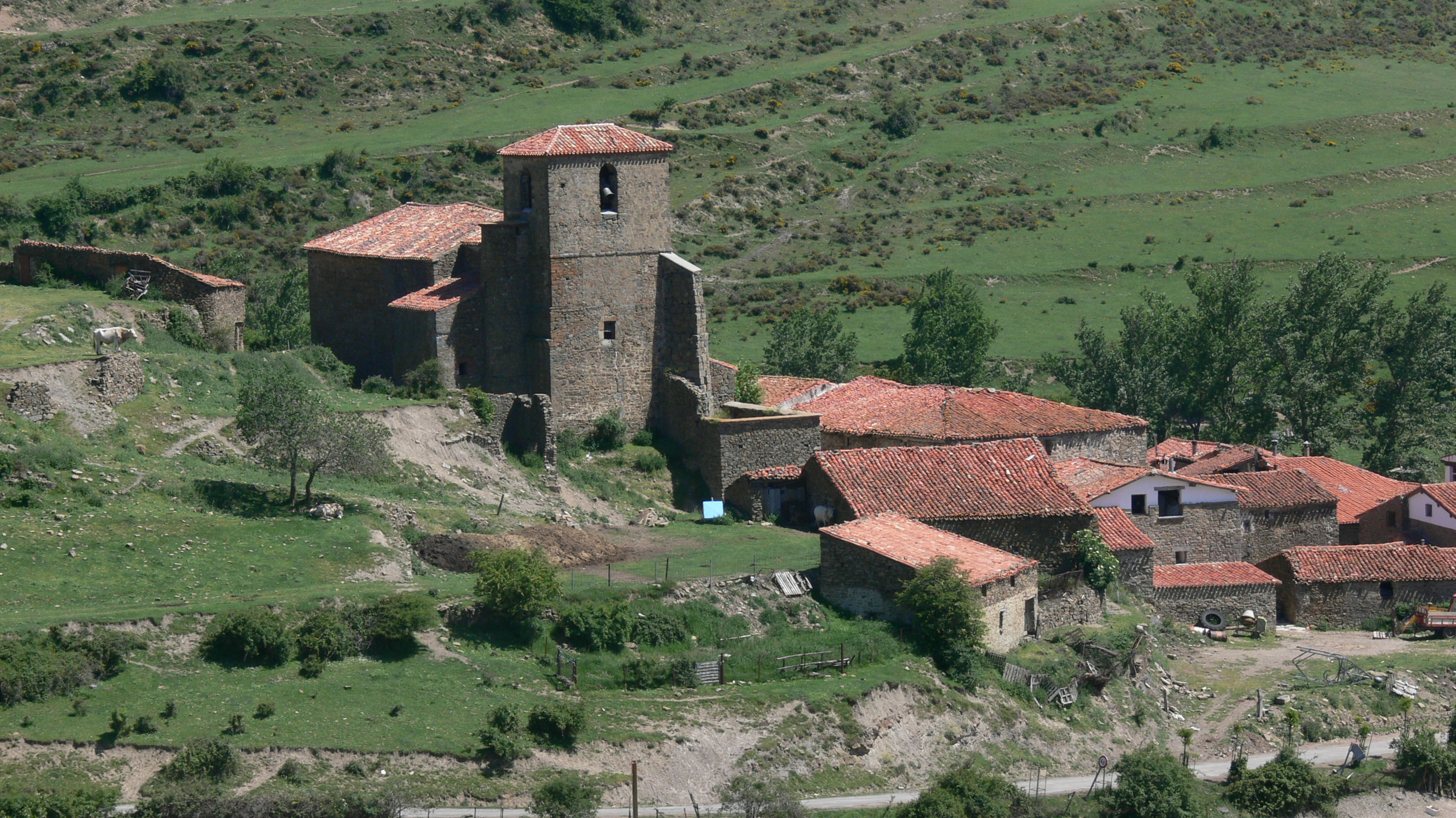 Hornillos de Cameros, La Rioja - España.